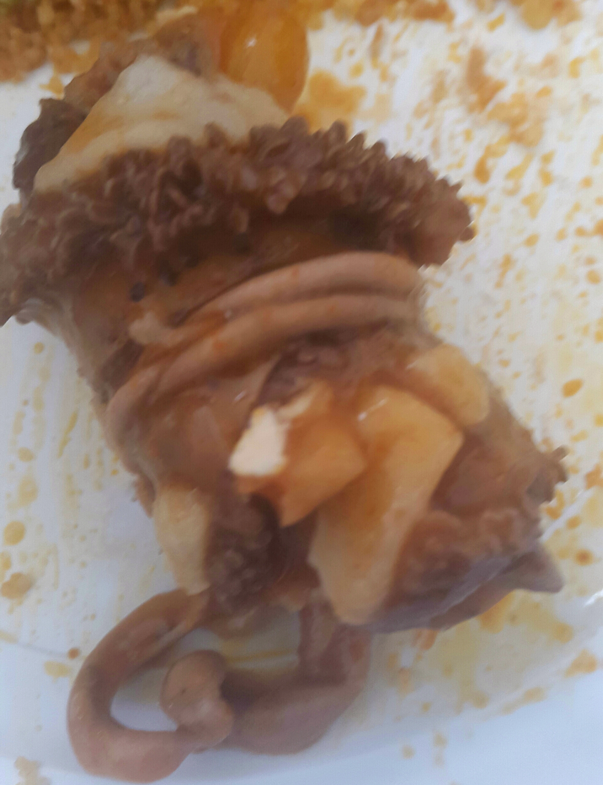 عصبان دويري من الجنوب التونسي This is an image of food from Tunisia